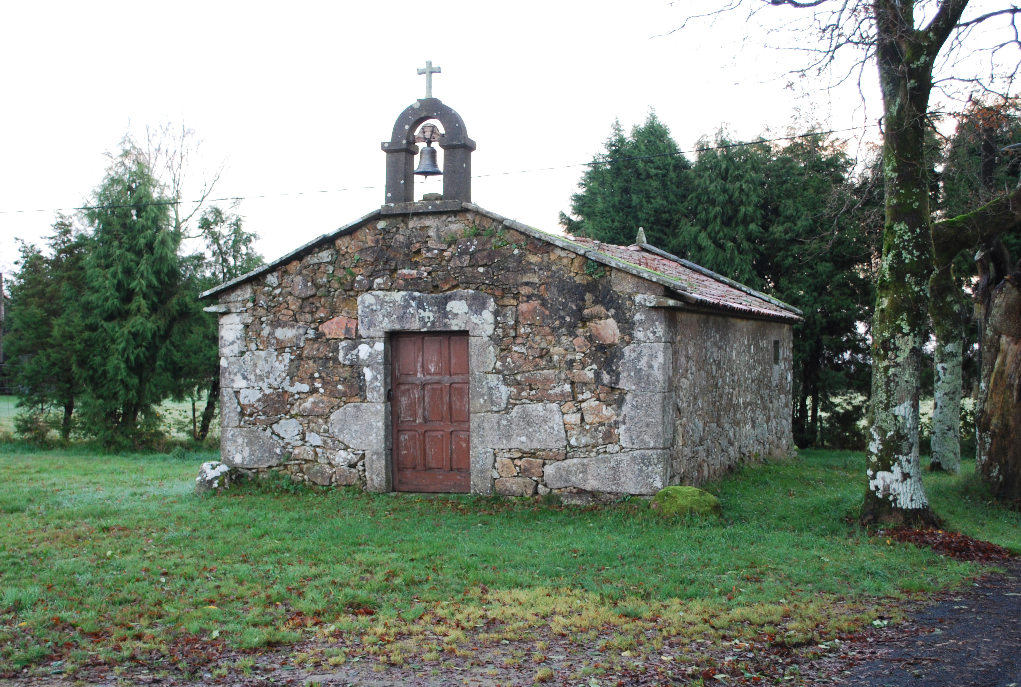 Capela no lugar do Brueiro, na parroquia de Rodeiro, concello de Oza-Cesuras